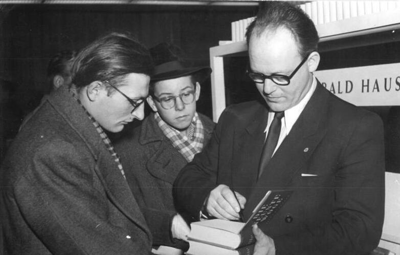 Zentralbild-Funck 21.11.1953 Zum Monat der Deutsch-Sowjetischen Freundschaft Schriftstellerbazar in Berlin. Am 21.11.1953 veranstalteten der Deutsche Schriftstellerverband und die Sektion Literatur der Gesellschaft für Deutsch-Sowjetische Freundschaft im Berolinahaus am Alexanderplatz einen Schriftstellerbazar. Zu Ehren des Monats der Deutsch-Sowjetischen Freundschaft verkauften bekannte deutsche Schriftsteller Bücher ihrer sowjetischen Kollegen. UBz: Der Schriftsteller Harald Hauser signiert einem Besucher das Buch "Die 9. Woge" von Ilja Ehrenburg.